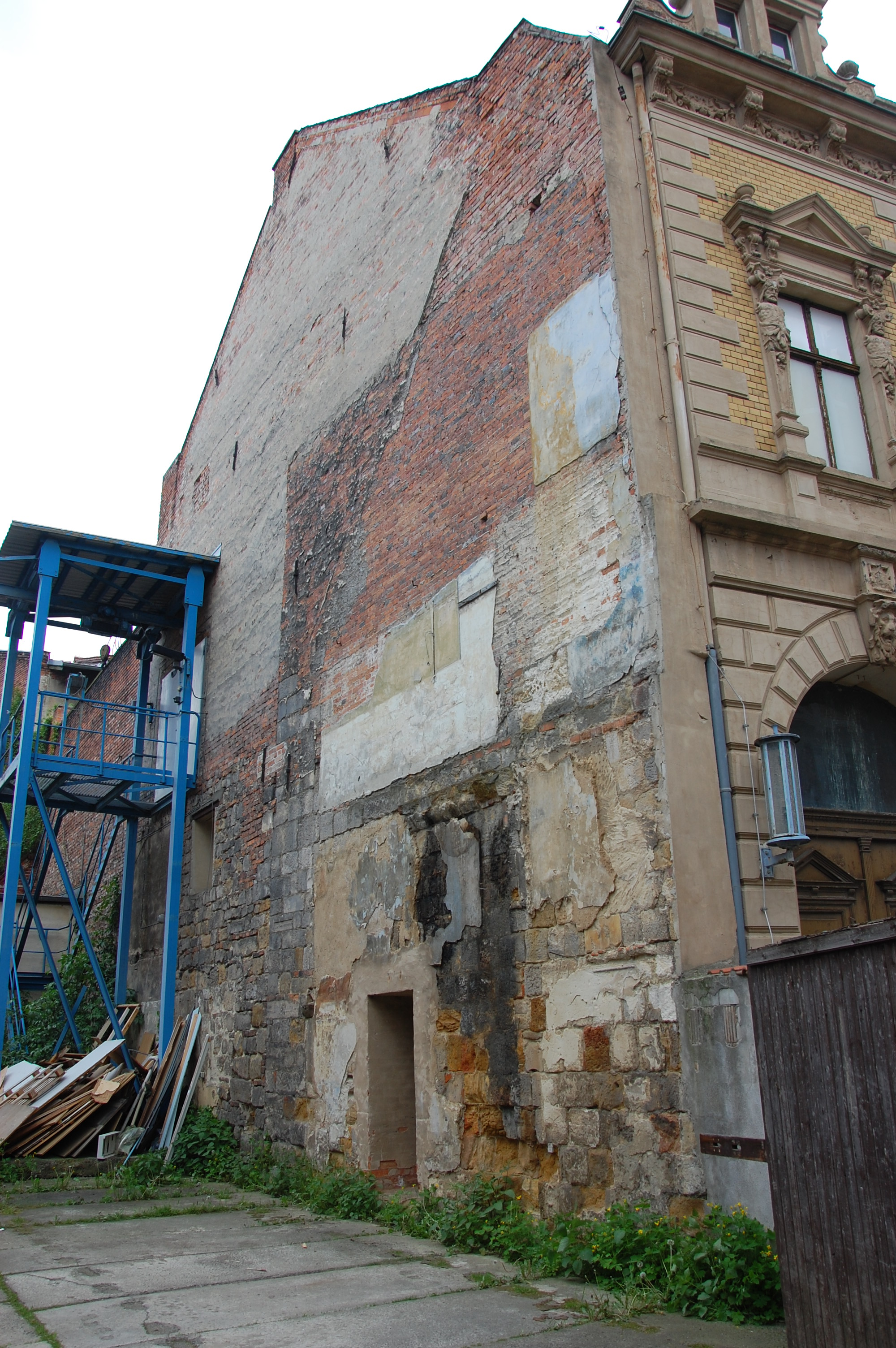 Kaiserhof in der Pölle in Quedlinburg Nordseite